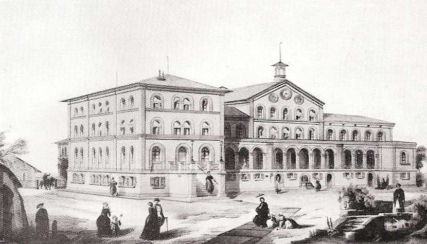 Empfangsgebäude des alten Hofer Kopfbahnhofes im Stadtzentrum